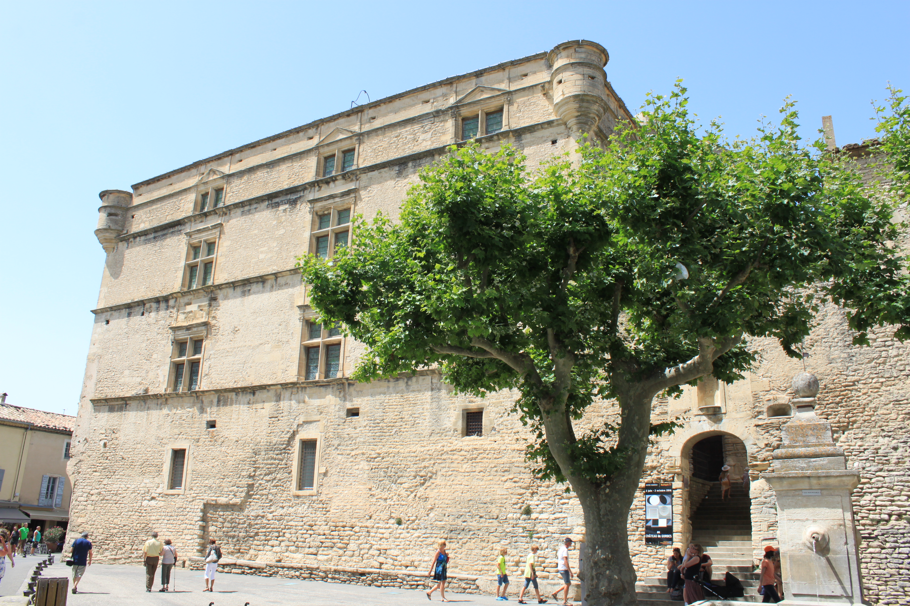 Gordes, Vaucluse, France